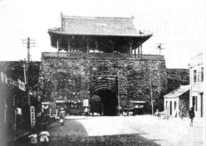 中文（中国大陆）: 沈阳大南门